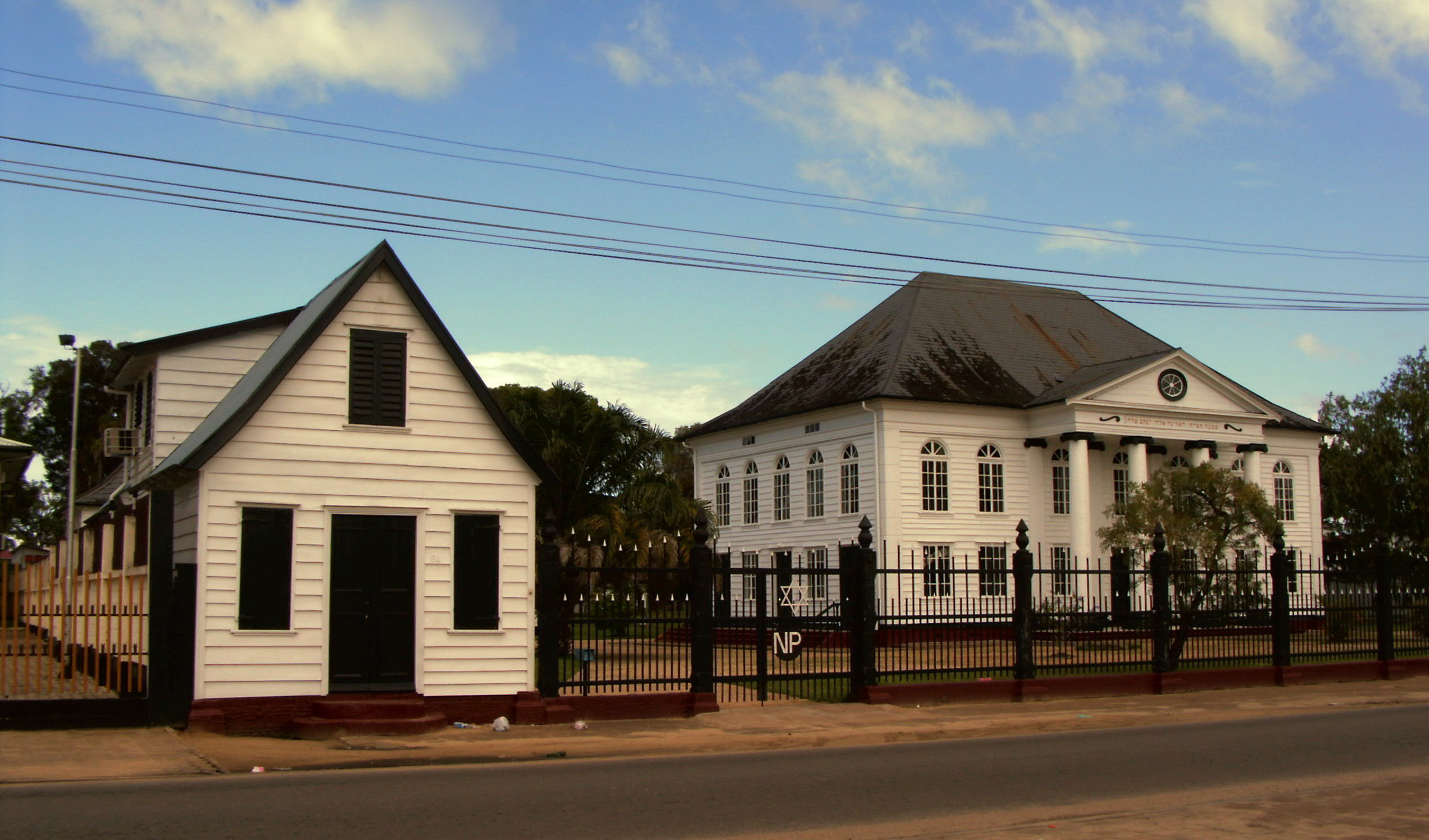 Foto vom Nutzer Brokopondo selbst erstellt und als gemeinfrei (PD) eingestellt. Es zeigt die Synagoge der jüdischen Gemeinde in Paramaribo, Suriname.